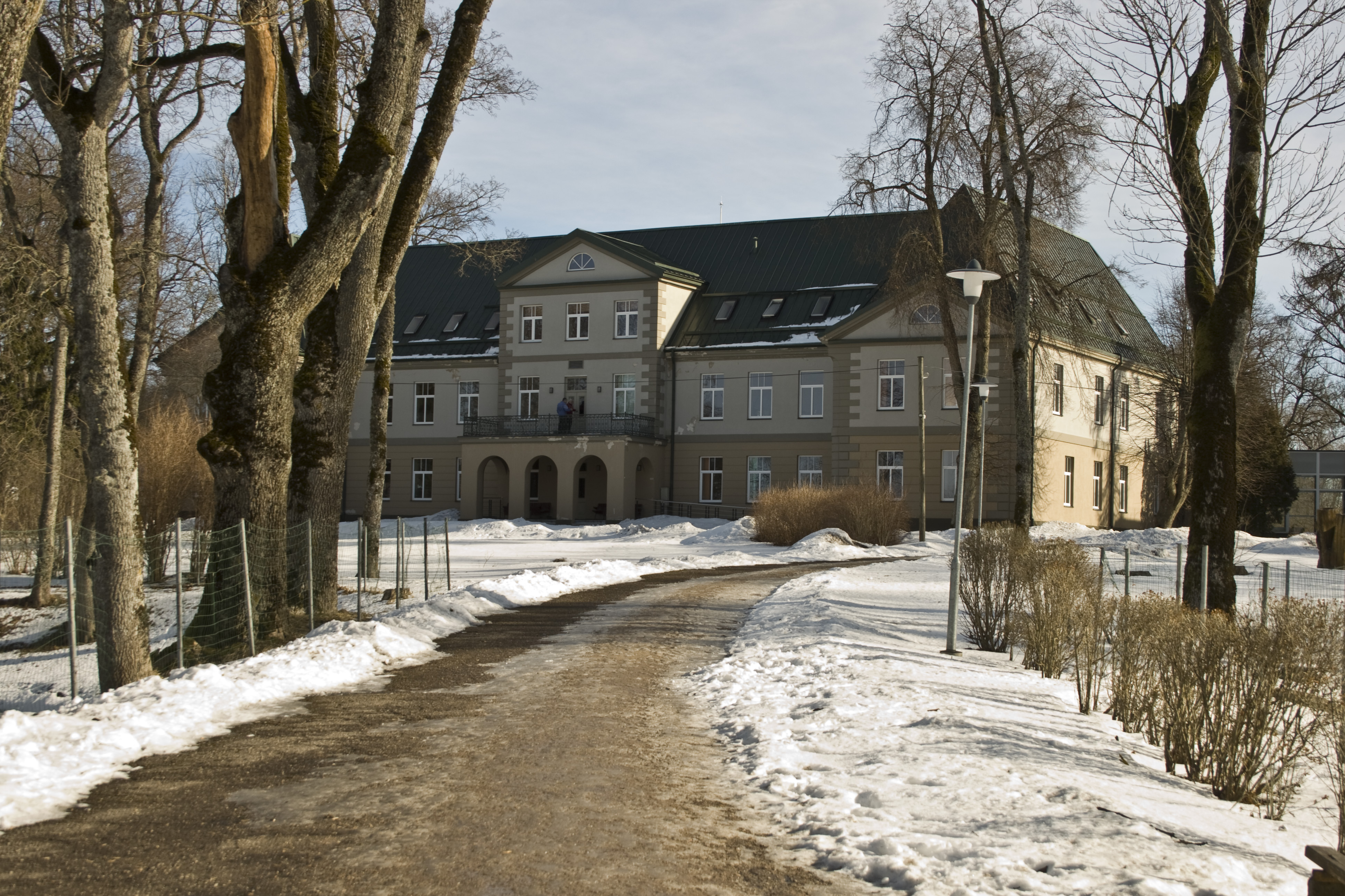 Iļģu manor